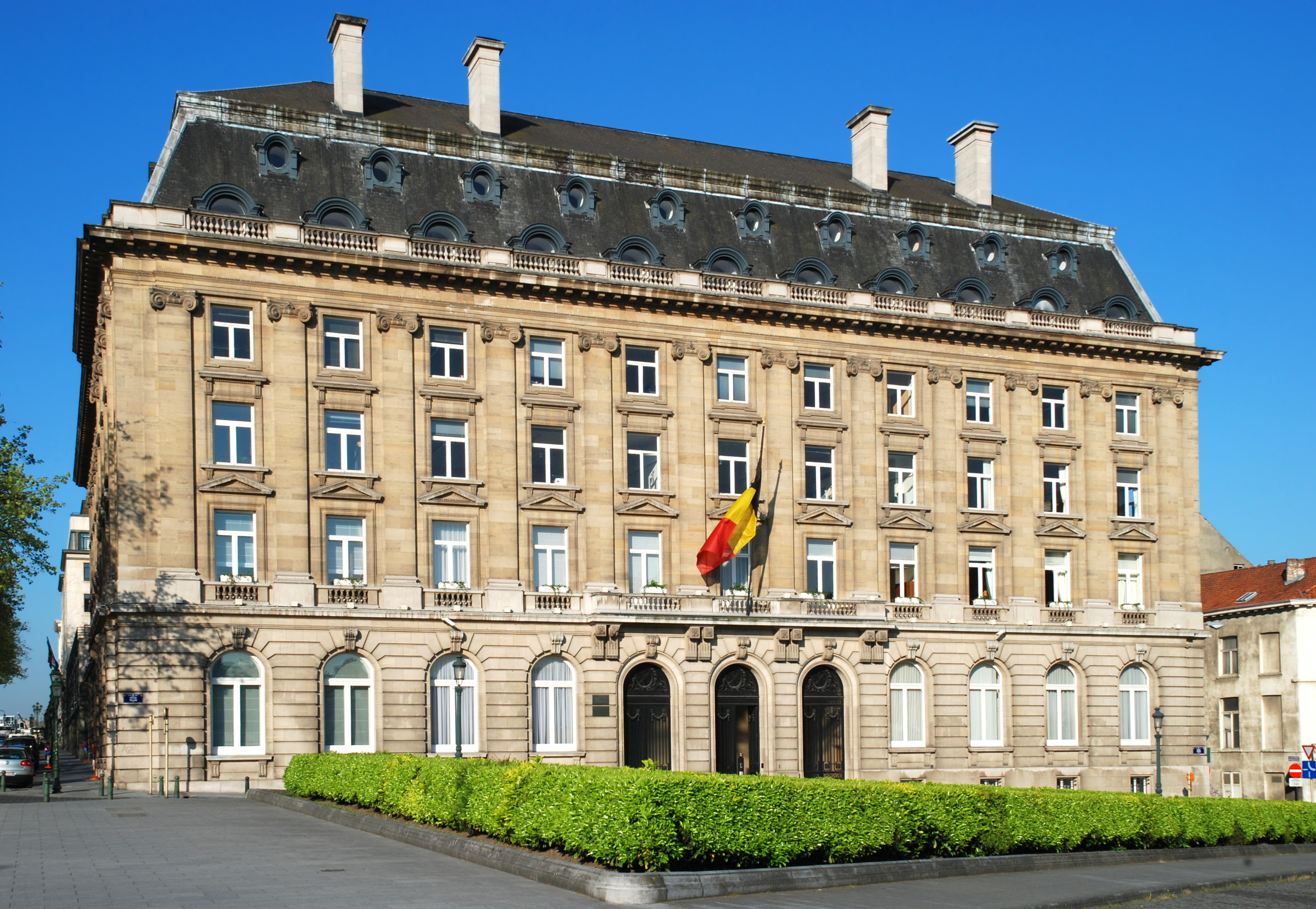 Belgique - Bruxelles - Place du Trône - Architecte Michel Polak - Siège de Tractebel (1930)